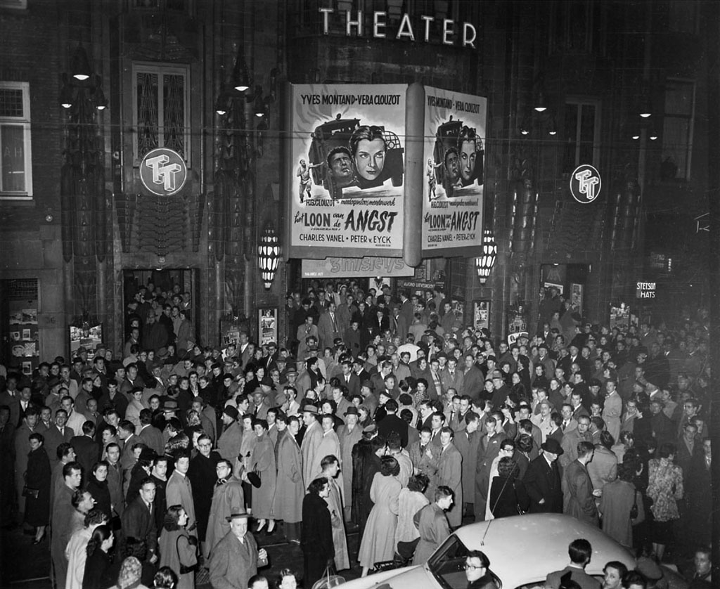 Drukte bij Tuschinski Theater bij het uitgaan van de film 'Het loon van de angst' (Le Salaire de la Peur, Henri-Georges Clouzot, 1953) met Yves Montand en Véra Clouzot, Reguliersbreestraat, Amsterdam, 20 november 1953. Foto Ben van Meerendonk / AHF, collectie IISG, Amsterdam